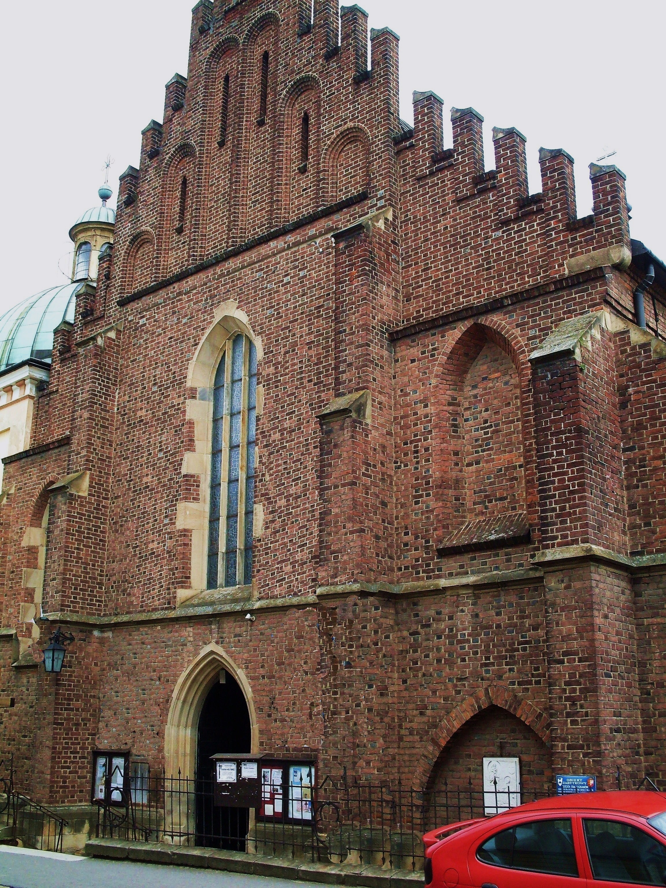 Krosno, kościół p.w. Nawiedzenia NMP, pocz. XV, 1 poł. XVII, 1899-1904